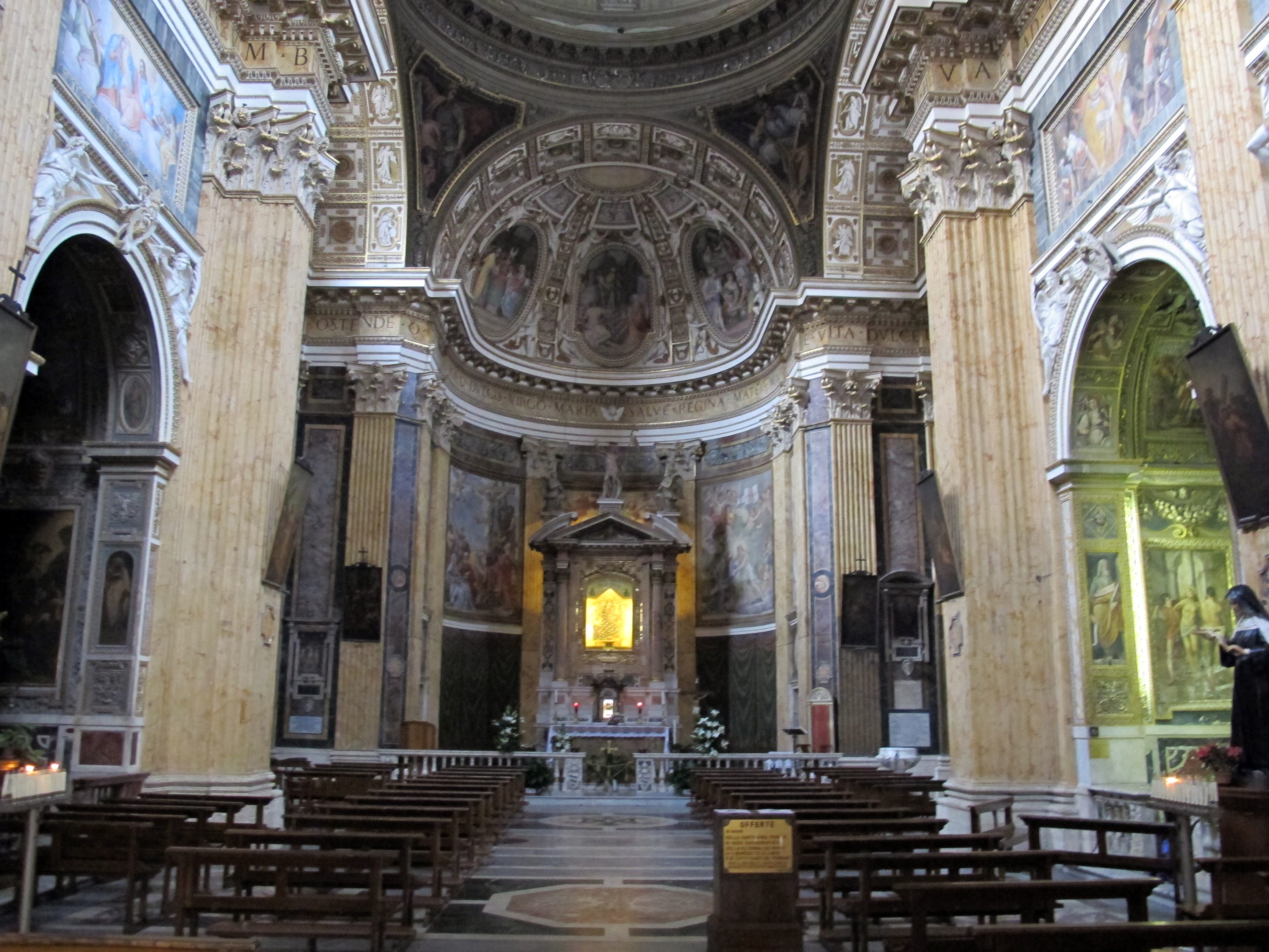 Santa maria ai monti, interno